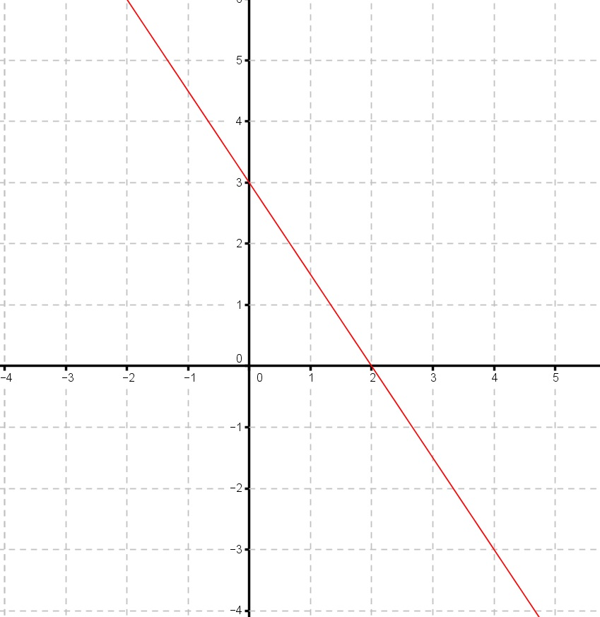 Forma gráfica